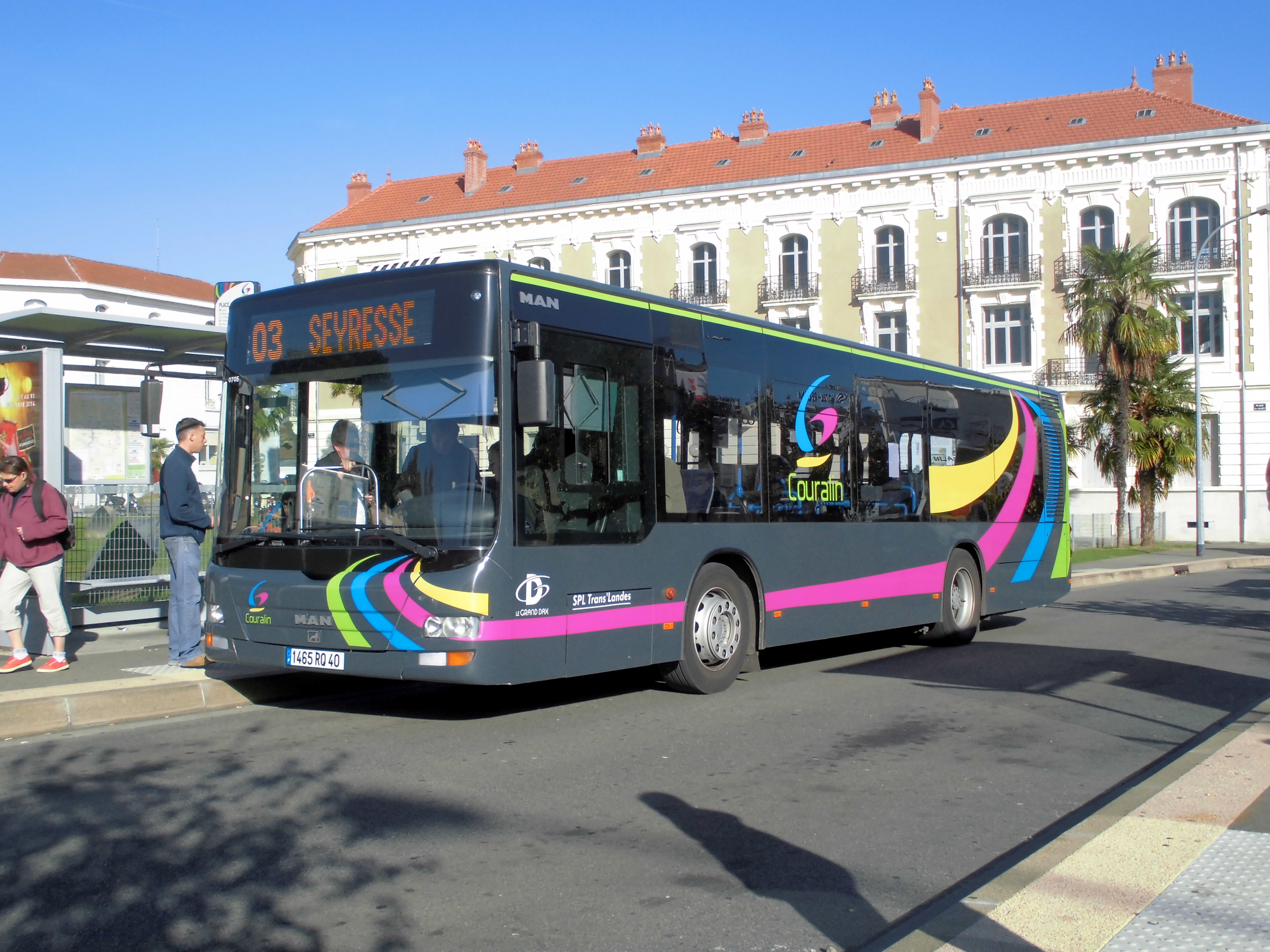 Bus ligne 03 Saint-Pierre à Dax.